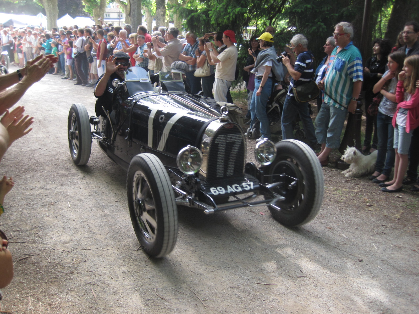 Caroline Bugatti (fille de Michel Bugatti, petite fille d'Ettore Bugatti ) au Salon Retro Mobile 2011 de Lons-le-Saunier à la place passager de sa Bugatti Type 35B